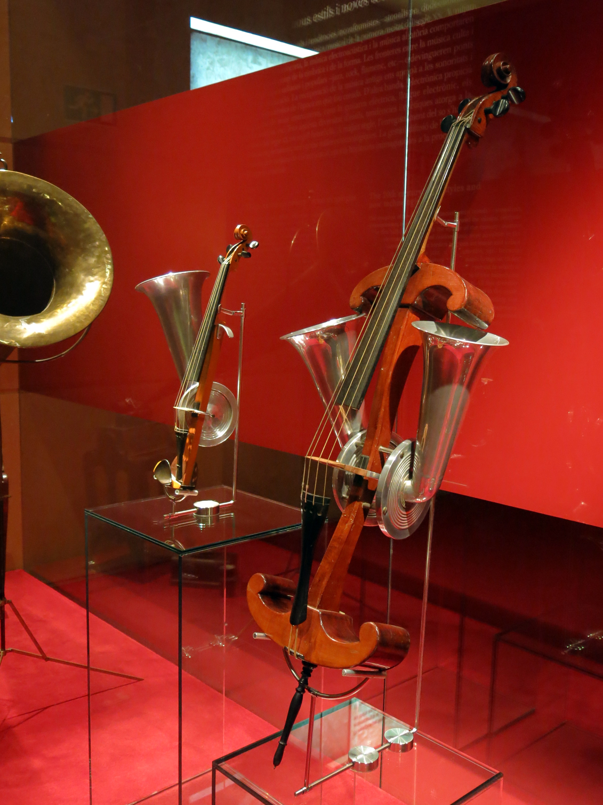 Violoncel de botzina by Compagnie française du gramophone. Barcelona. Primera meitat segle XX. Museu de la Música de Barcelona. (MDMB 969).